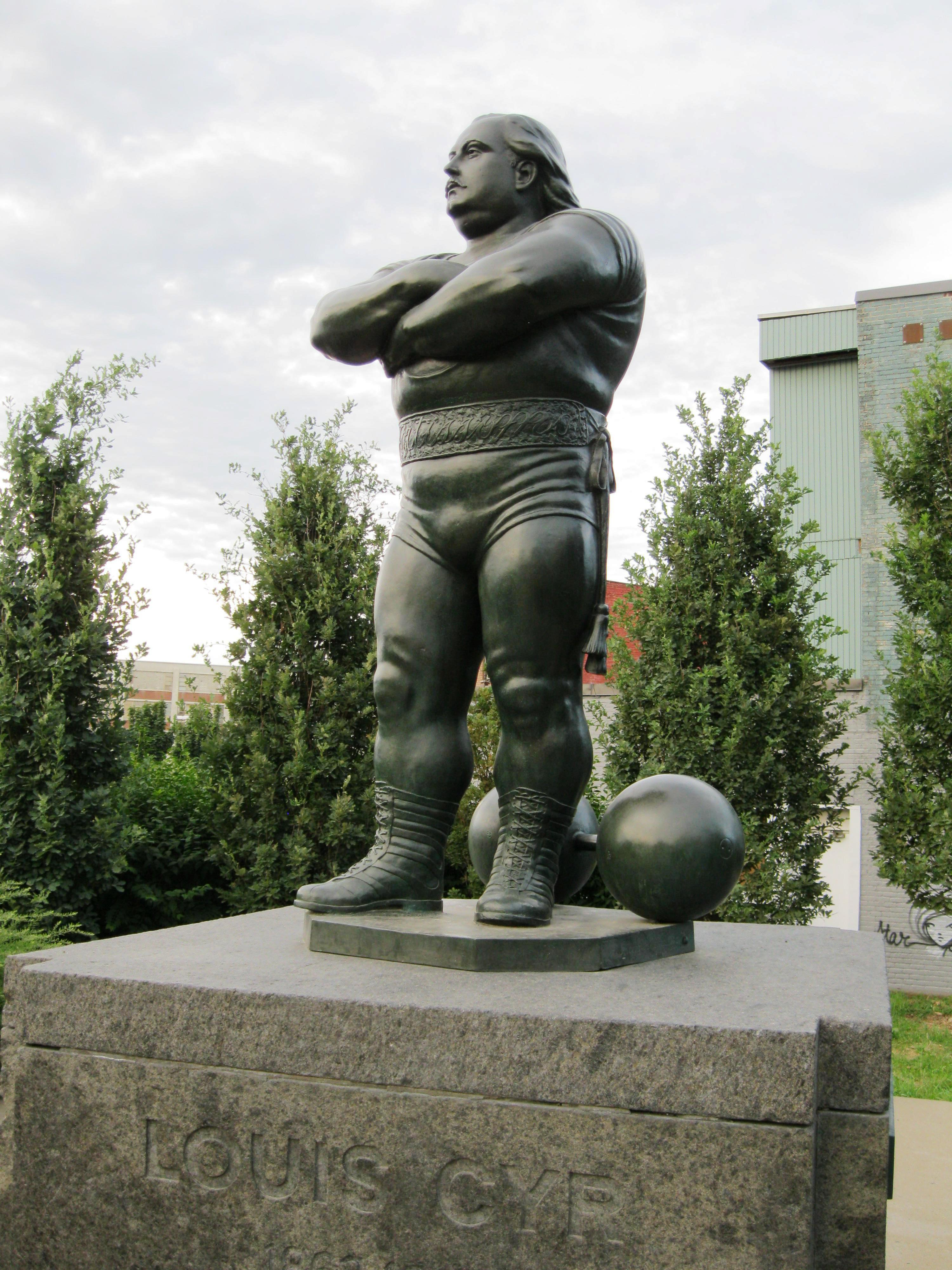 Le monument à Louis Cyr est une sculpture de Robert Pelletier (1914-1984) situé dans le quartier Saint-Henri à Montréal. Il fut inauguré en juin 1973 dans le square Élizabeth, renommé parc des Hommes-Forts en 1994.